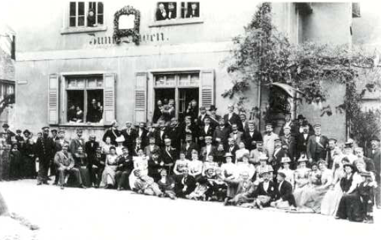 Gasthaus zum Löwen in Zwingenberg an der Bergstraße 1868 bei der Gründung des LC.